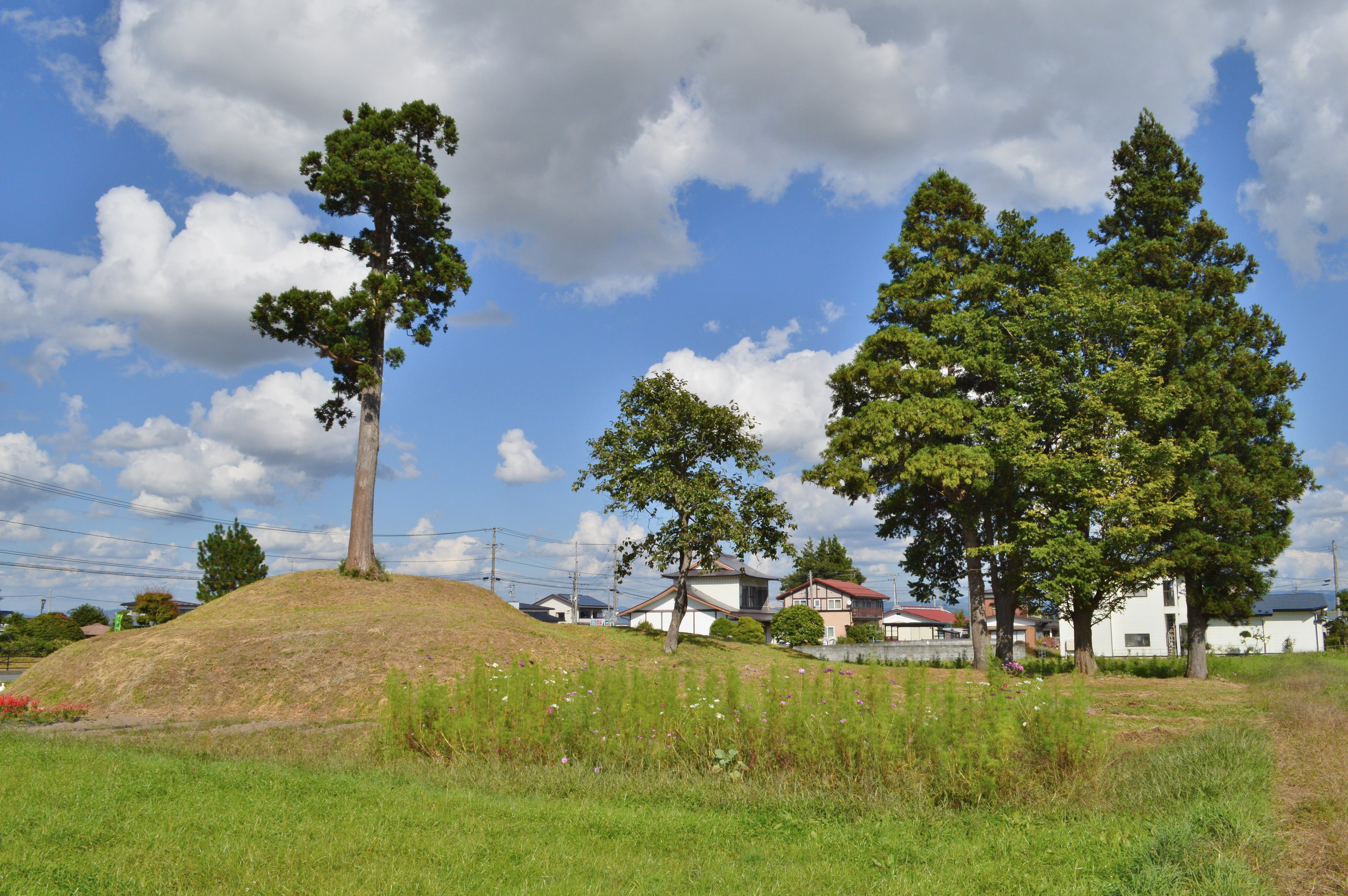 角塚古墳 全景